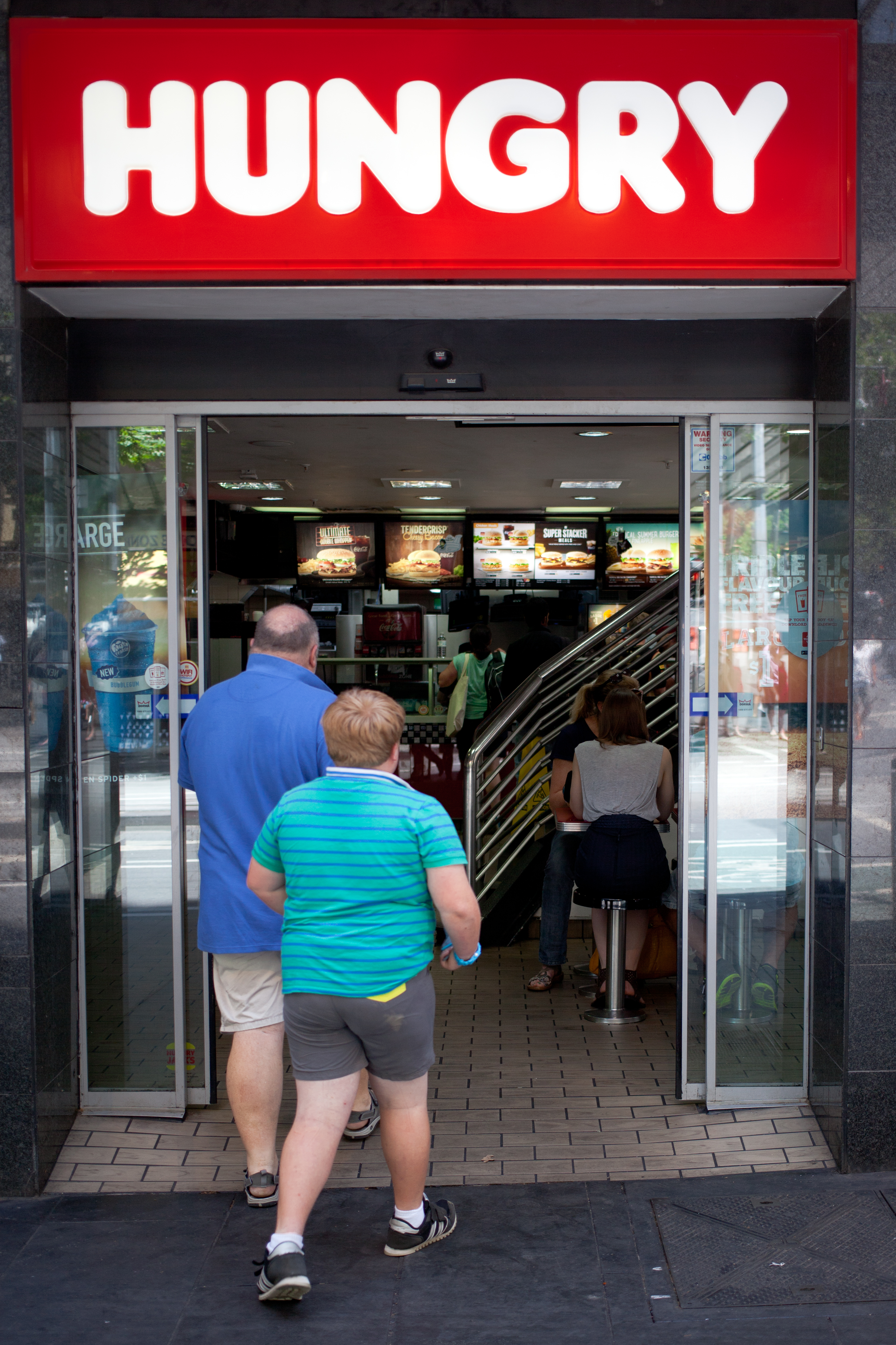 Melbourne 2014